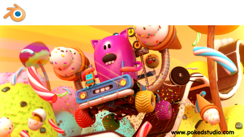 Blender-Version 2.77 Splash Blender Foundation - Blender